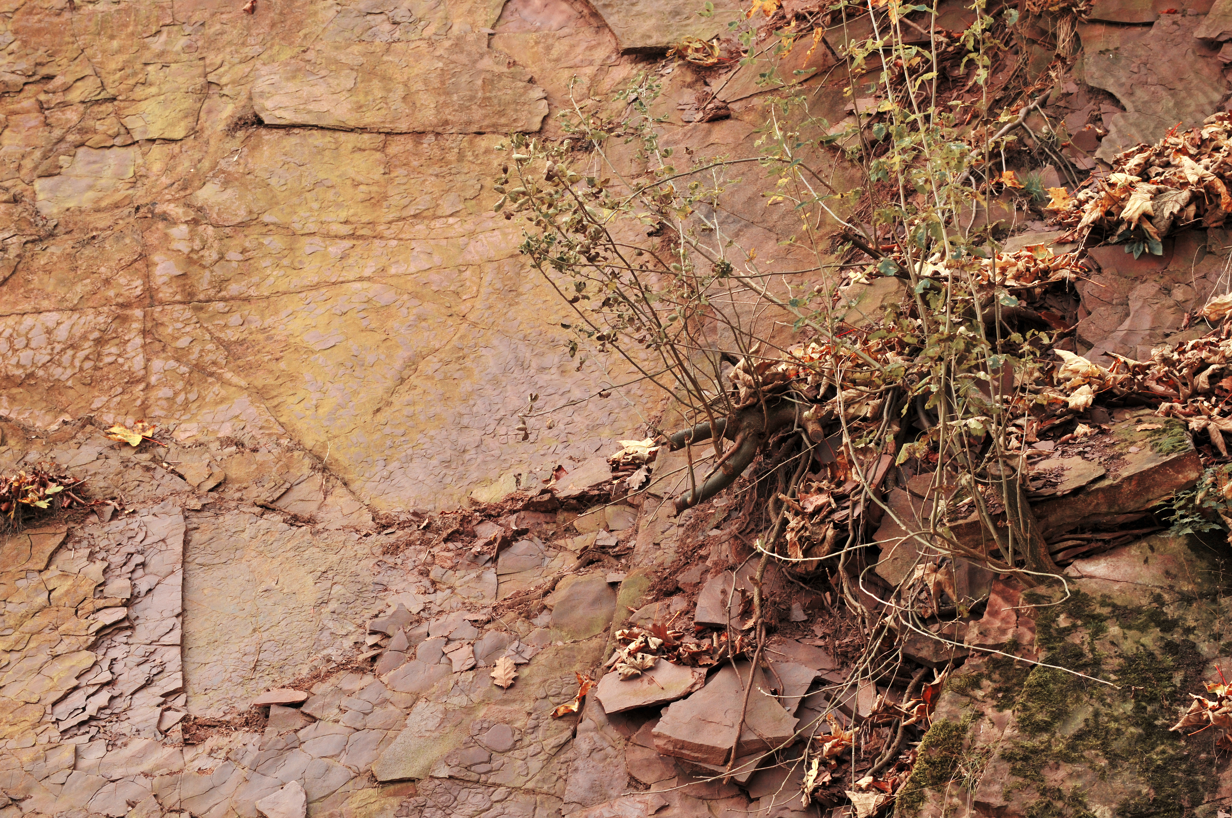 Abgerutschte Sandsteinplatten am Hang neben dem Schloss Marienburg in der Region Hannover, Niedersachsen, Deutschland.